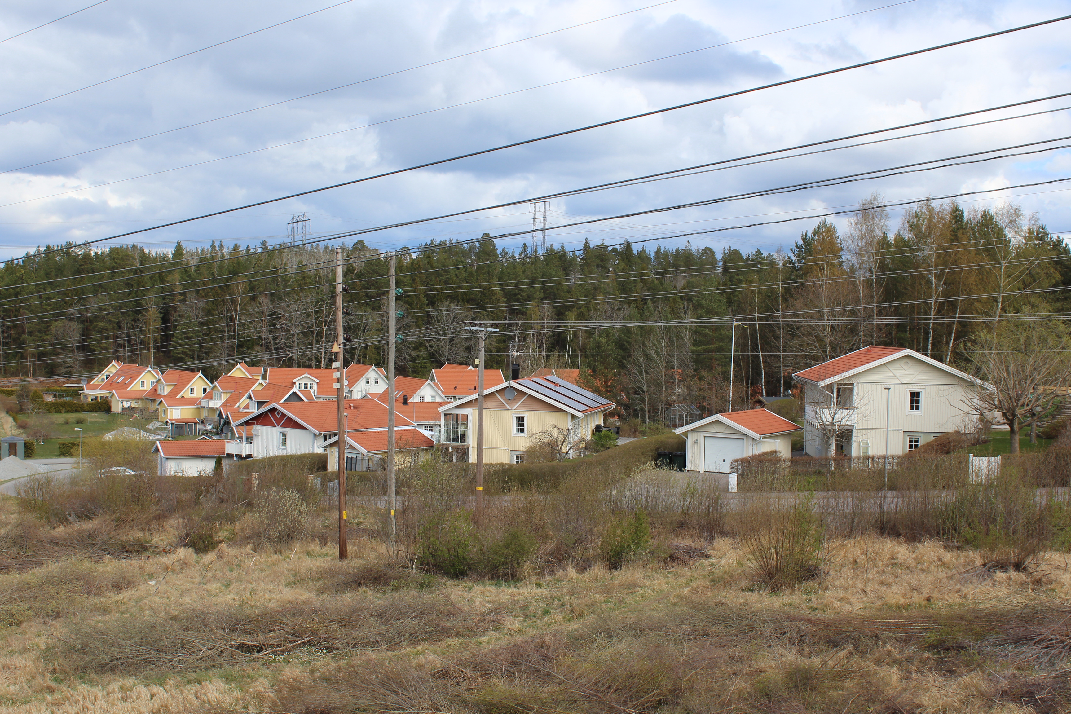 Vretarna, stadsdel i Tumba, Botkyrka kommun, byggnader i västra Vretarna